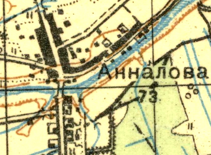 Топографическая карта Ленинградской области, квадрат О-36-14-А (п. Фёдоровский), деревня Аннолово